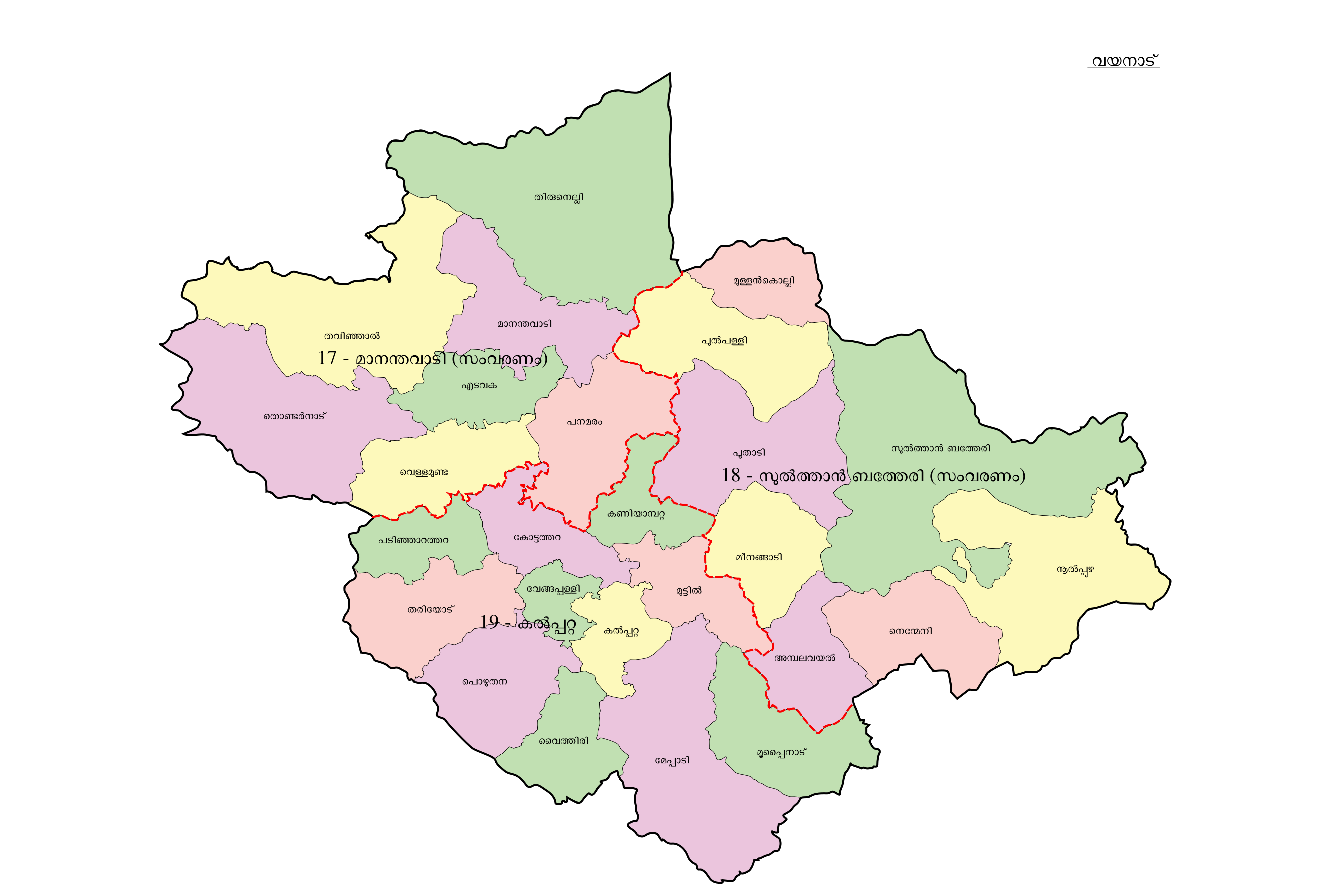 വയനാട് ജില്ലയുടെ ഭൂപടം മലയാളത്തിൽ - പി.എൻ.ജി ഫോർമാറ്റ്